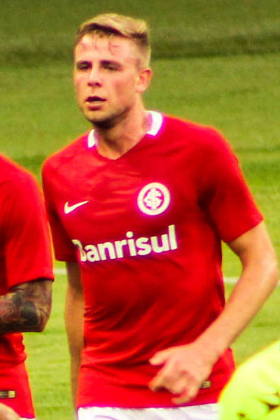 Klaus em sua partida de estreia no Inter em 2017